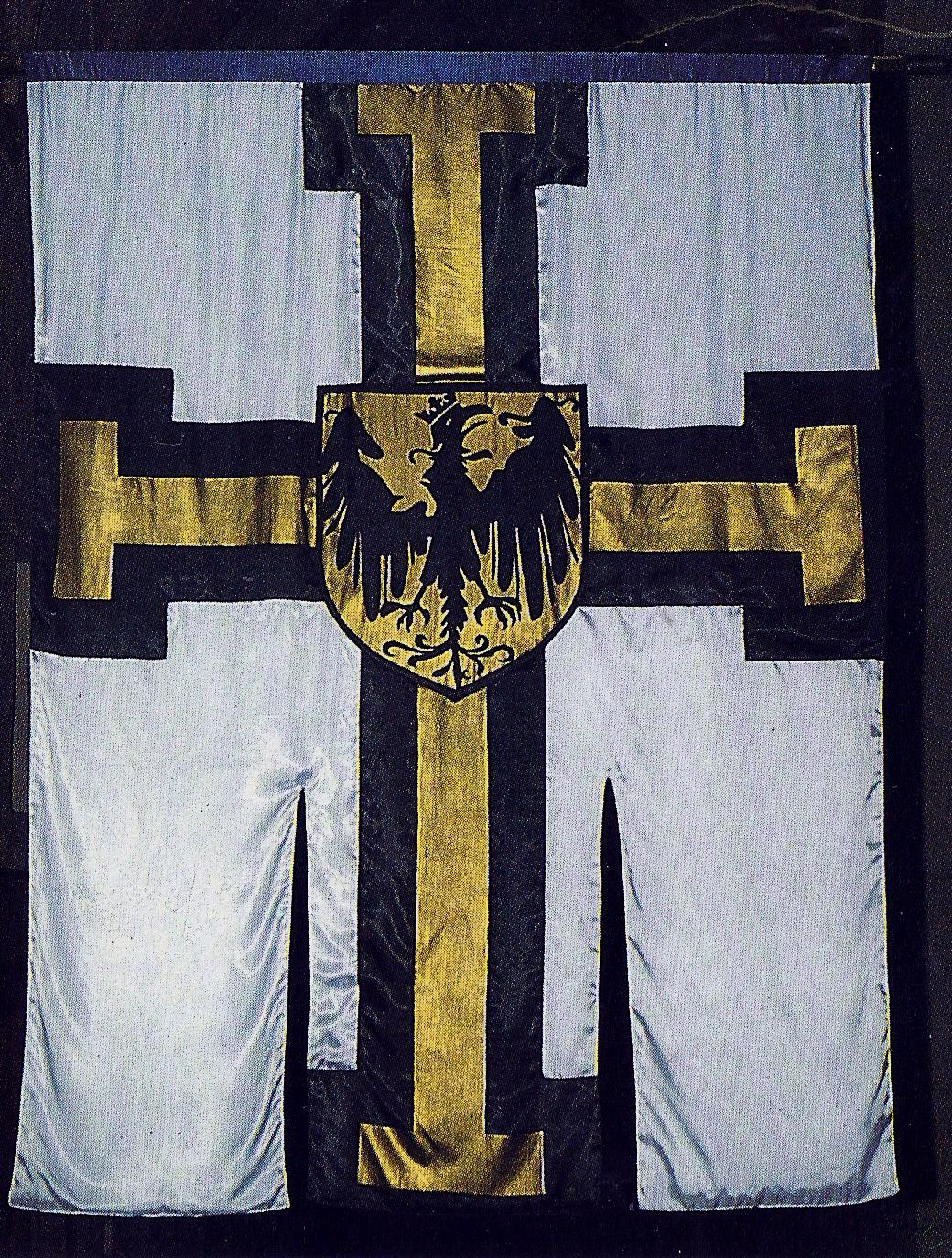 Fahne des Deutschritterordens in der Marienburg